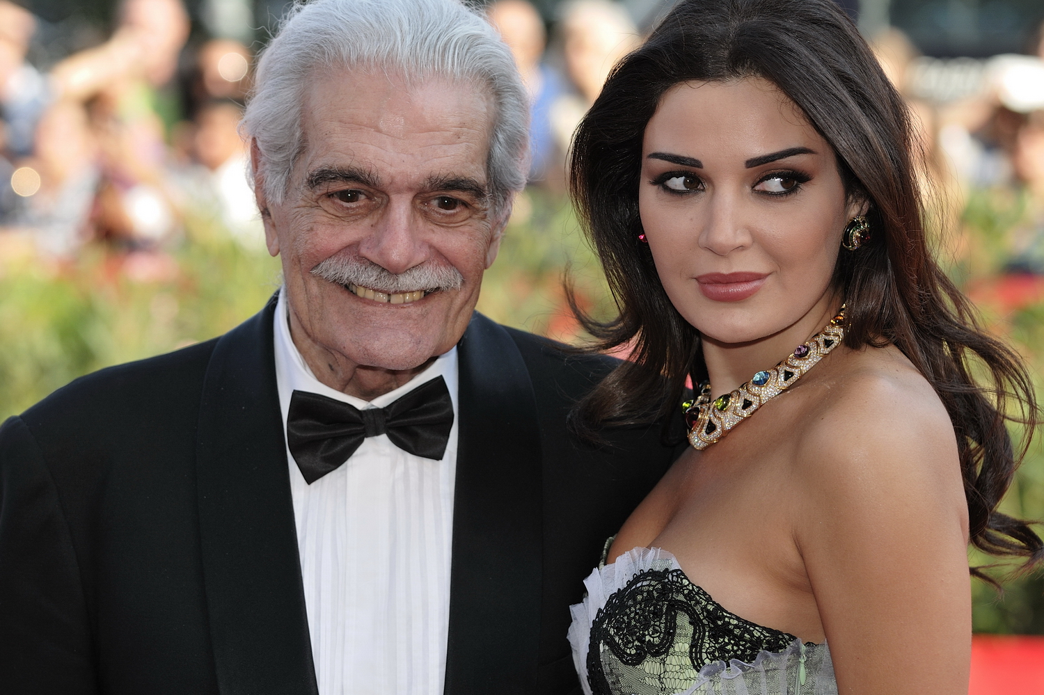 66ème Festival du Cinéma de Venise (Mostra), 9ème jour (10/09/2009) Tapis rouge avec Omar Sharif et Cyrine AbdelNour pour le film The Traveller de Ahmed Maher